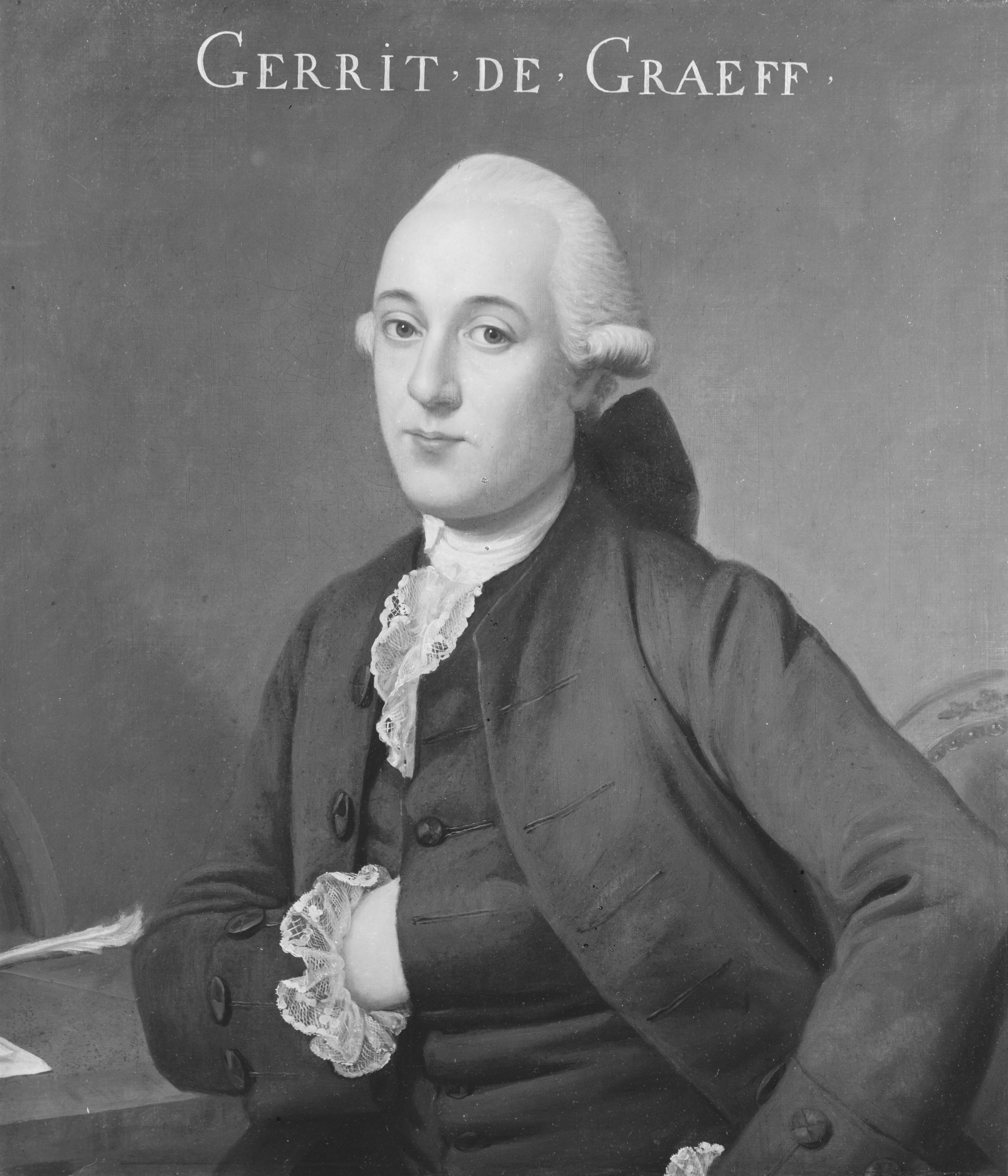 Gerrit de Graeff (1711-1752) (detail van een grotere afbeelding)